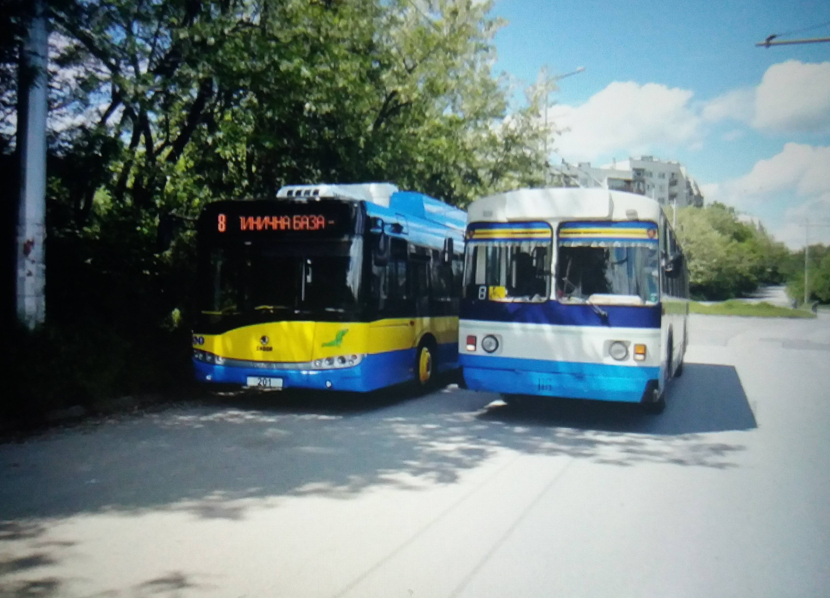 Току-що новопристигнал тролейбус Шкода и стар ЗиУ